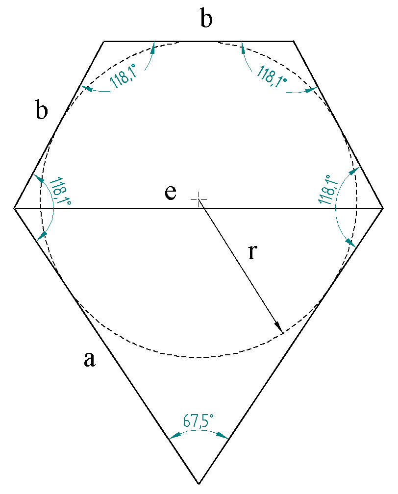 Größen im Fünfeck des Pentagonhexakontaeders